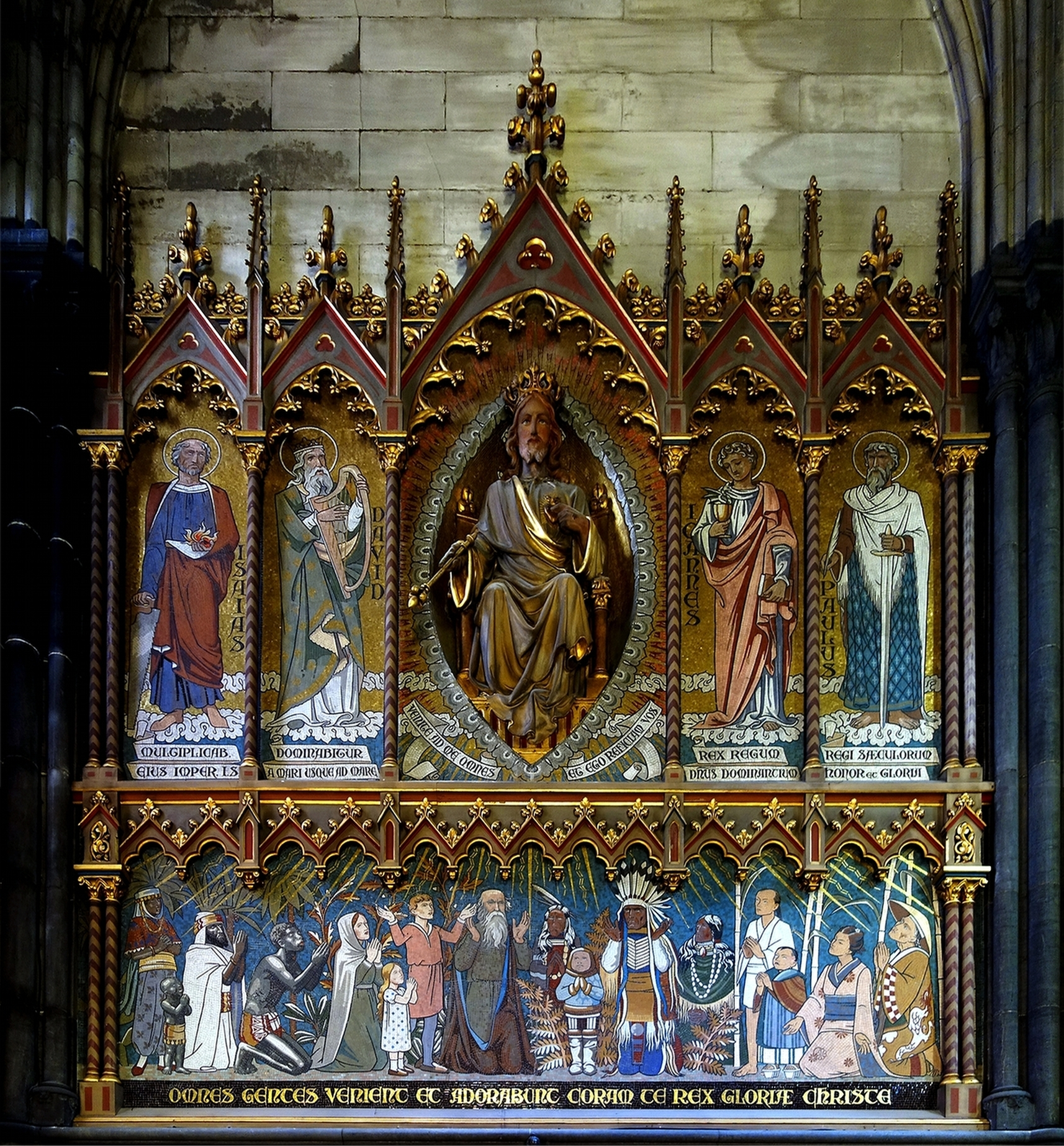 Mosaïque murale de la chapelle du Sacré-Cœur de Jésus dans la Cathédrale Notre-Dame-de-la-Treille à Lille.